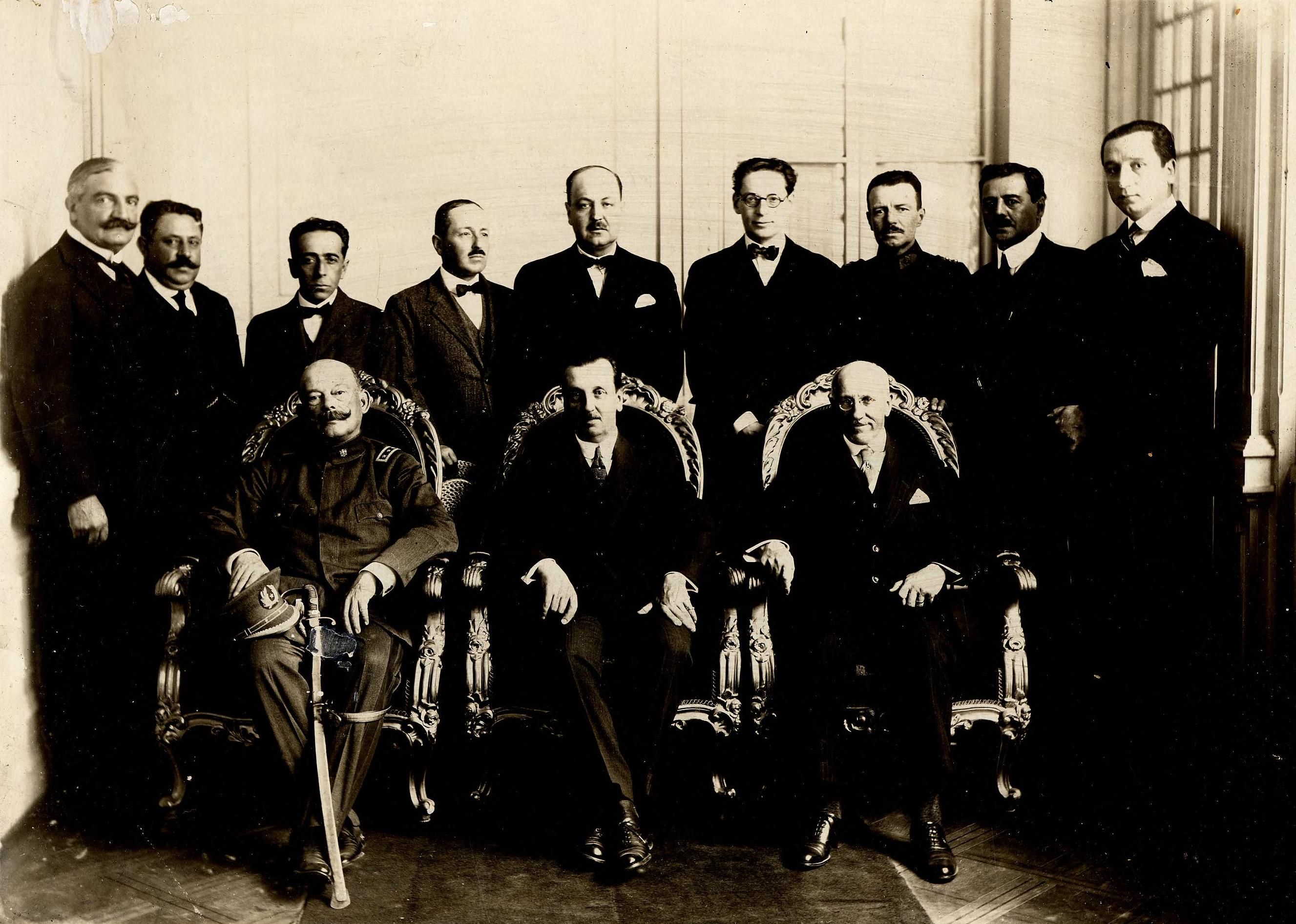 Junta de Gobierno y su Ministerio (27 de enero-20 de marzo de 1925). Sentados: al centro, el Presidente de la Junta, Emilio Bello Codesido; el General Pedro Pablo Dartnell; y el Almirante Carlos Ward. De pie, de izquierda a derecha: los Ministros Claudio Vicuña S., Agricultura; Almirante Braulio Bahamonde, Marina; Valentín Magallanes, Hacienda; Jorge Matte, Relaciones Exteriores; Armando Jaramillo, Interior; José Maza, Justicia; Comandante Carlos Ibañez, Guerra; Francisco Mardones, Vías y Obras y el Dr. José Salas, Higiene. [fotografía].